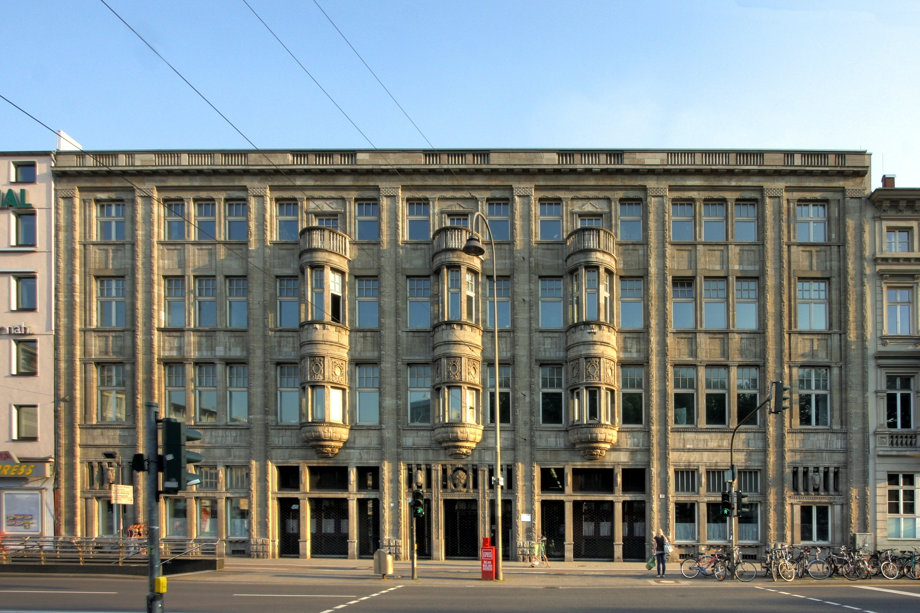 Gesundheitsamt der Stadt Köln, Neumarkt 15-19. Architekt: Heinrich Müller-Erkelenz. Baujahr: 1908/09.